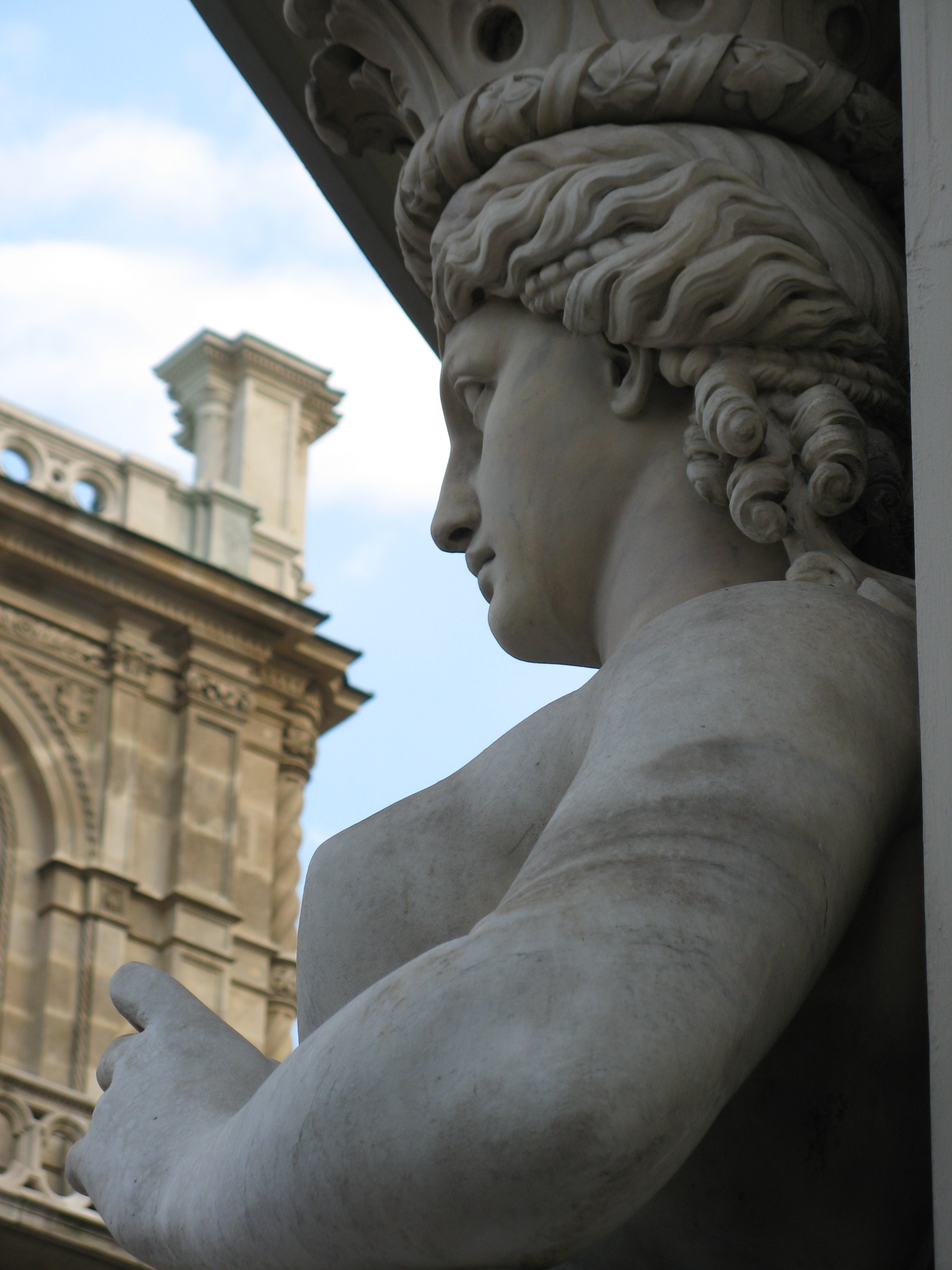 Karyatide (um 1863) von Josef Cesar, Operngasse 2, Wien-Innere Stadt